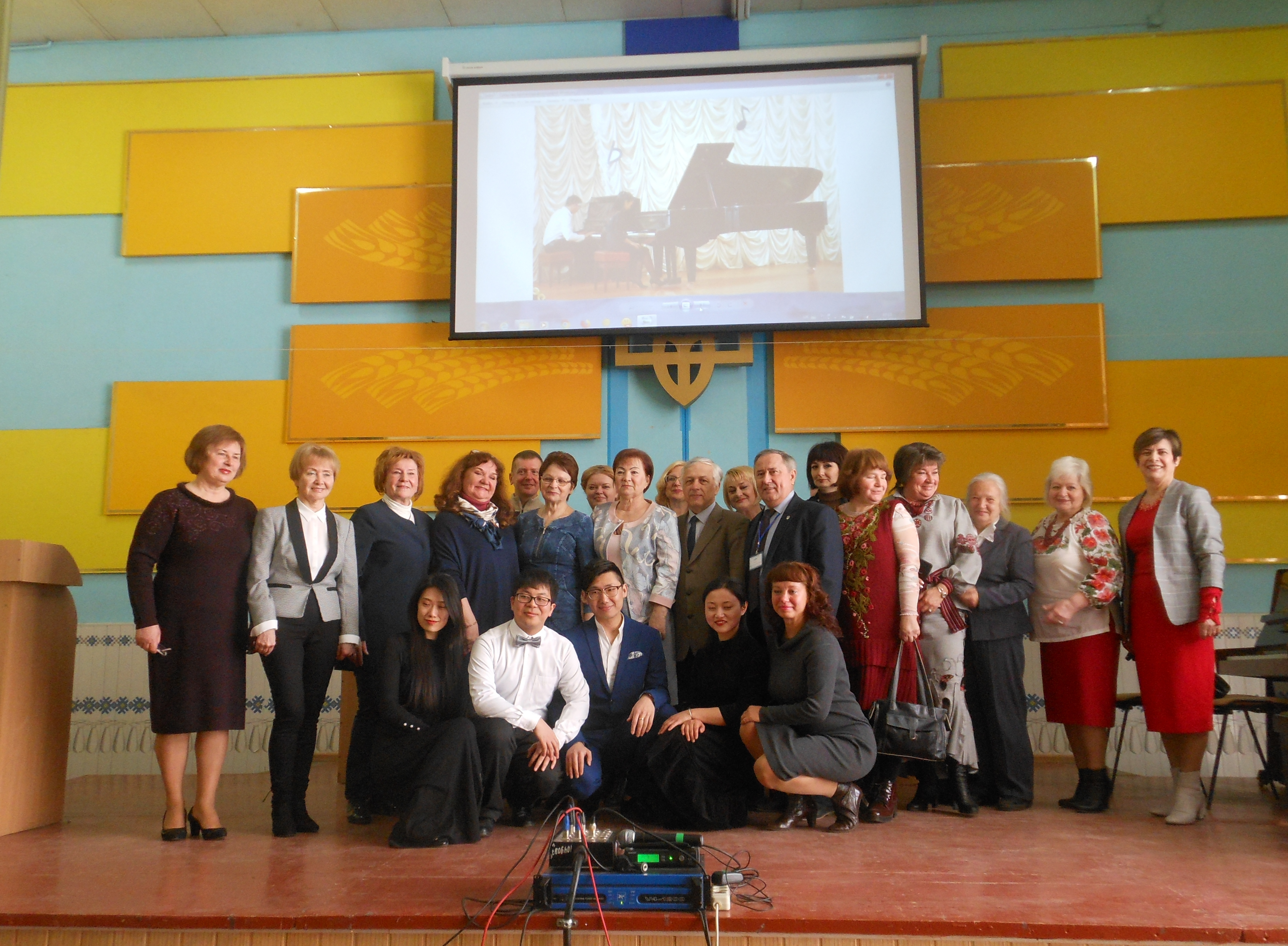 Бар, Міжнародна конференція в пед коледжі 04-2019 р.